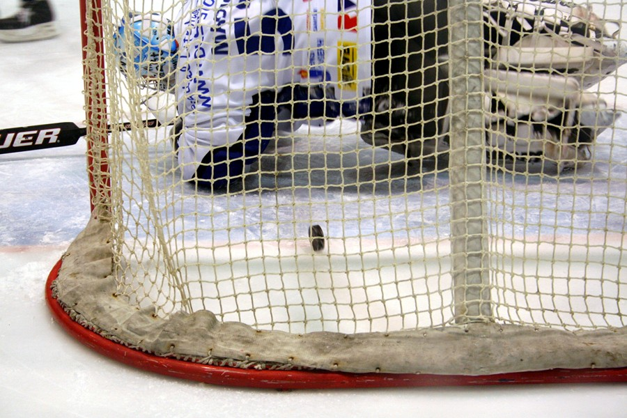 ESC Moskitos Essen vs. ESC Eisloewen Dresden, 2. Bundesliga 2005/06